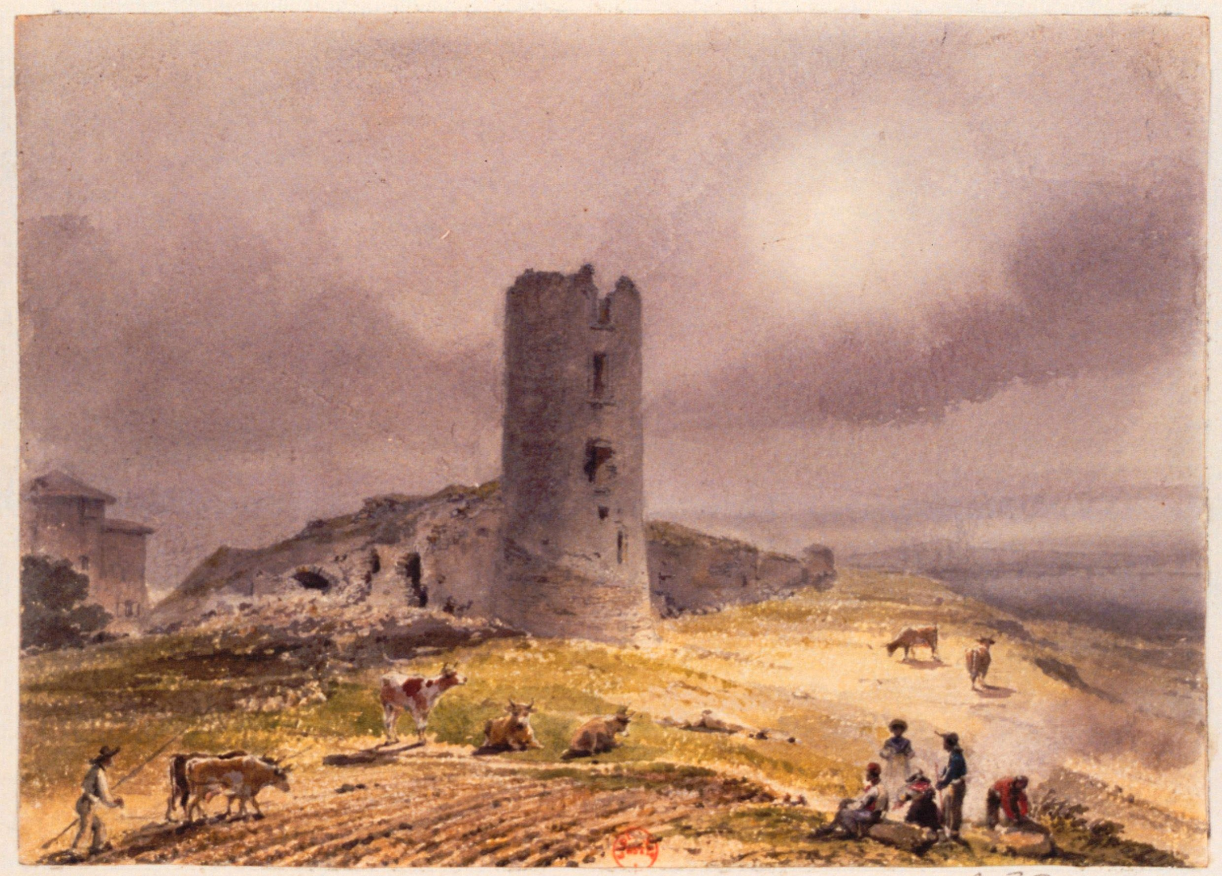 Le premier château de Thuretlabel QS:Lfr,"Le premier château de Thuret"